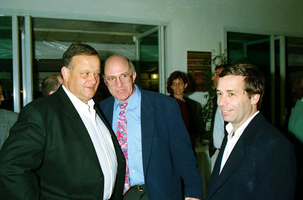 דני וסלי עם דן שילון ויוחנן צנגן בעת שכיהן כמנהל התכניות ב"רשת"